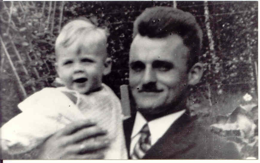 Cornelis Verduijn, geboren 6 april 1907 te Alkemade (ZH),; gefusilleerd op 20 maart 1945 te Loosdrecht.; Bijgezet in het Mausoleum op de Paasberg